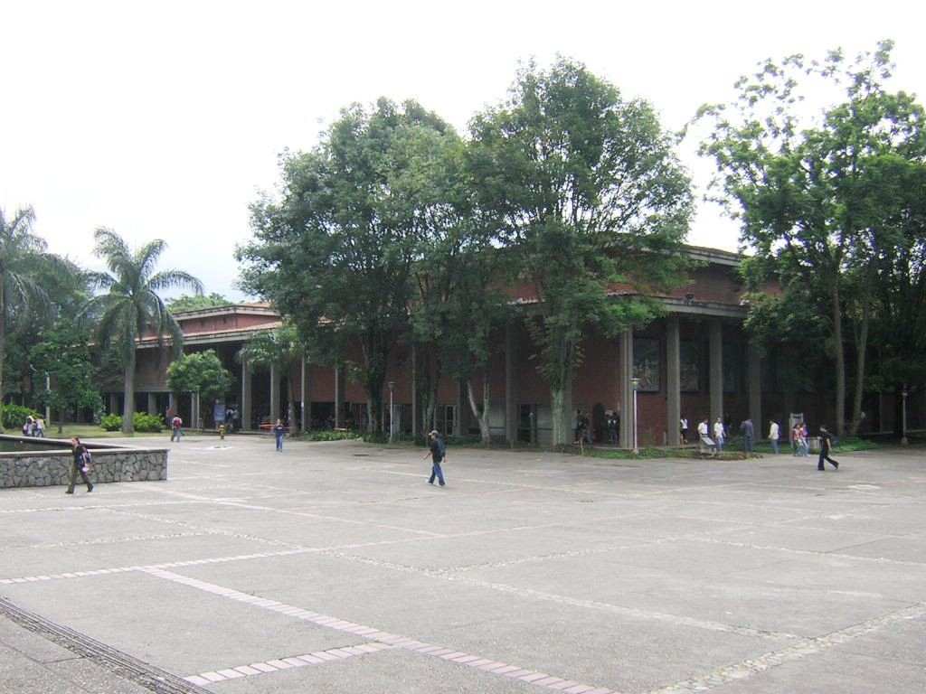 Teatro Universitario, Universidad de Antioquia, Medellín, Colombia (esta foto la tome yo, y la libero al dominio público)